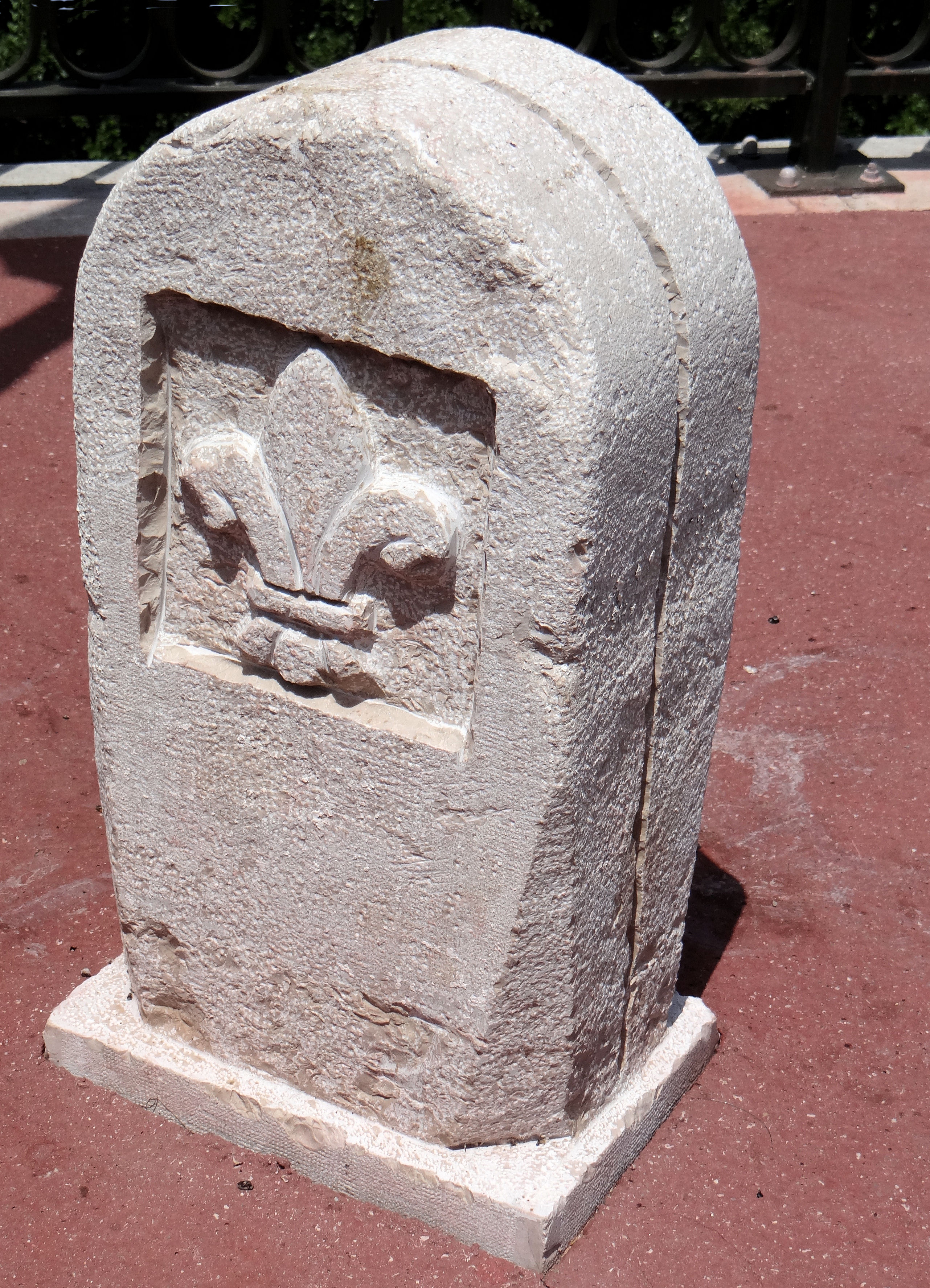 Roquestéron-Grasse - Borne frontière sur le pont avec les armes du roi de France